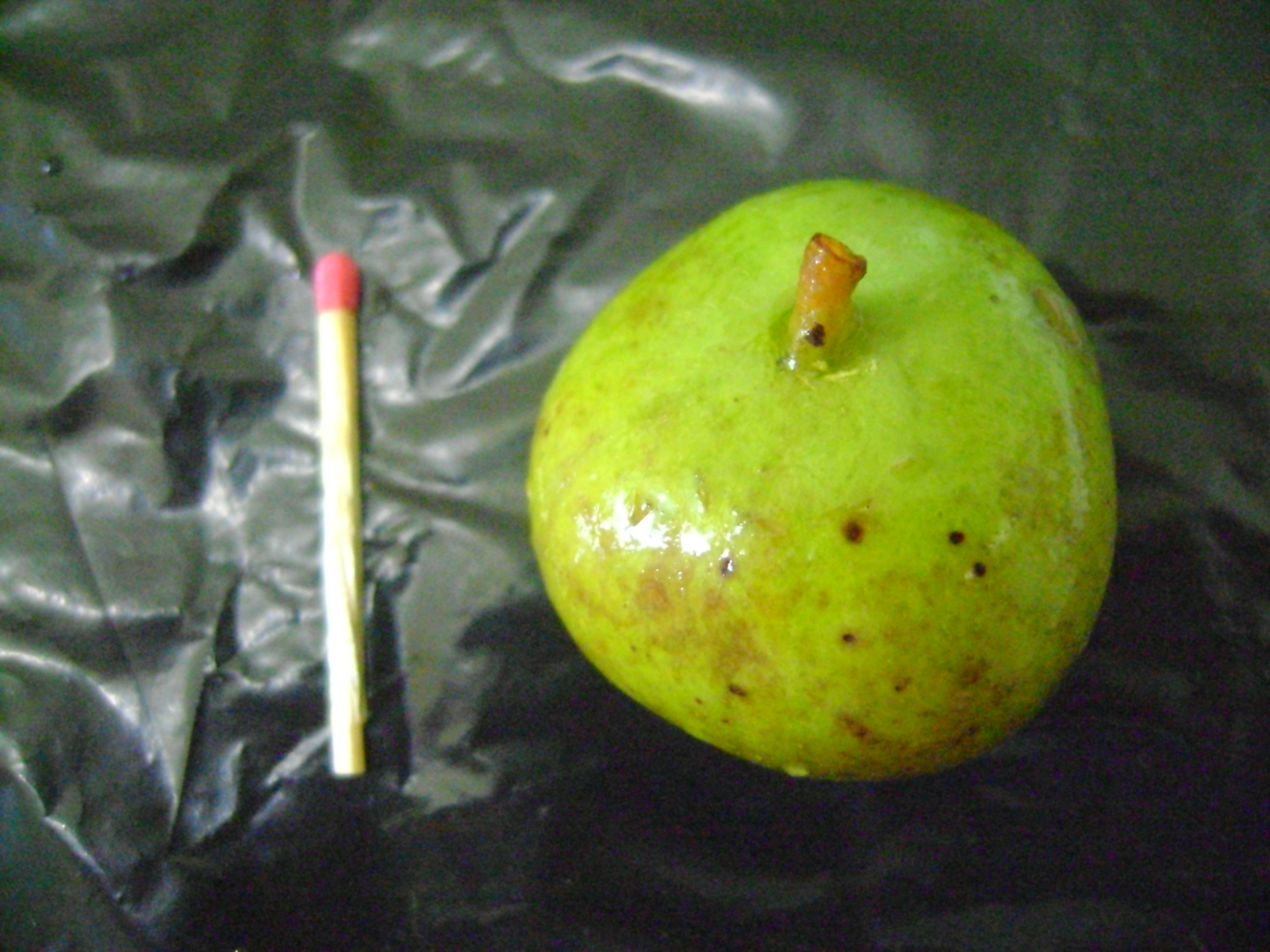 Fruto verde de mandapuçá, Mouriri pusa, oriundo do Cerrado mineiro.